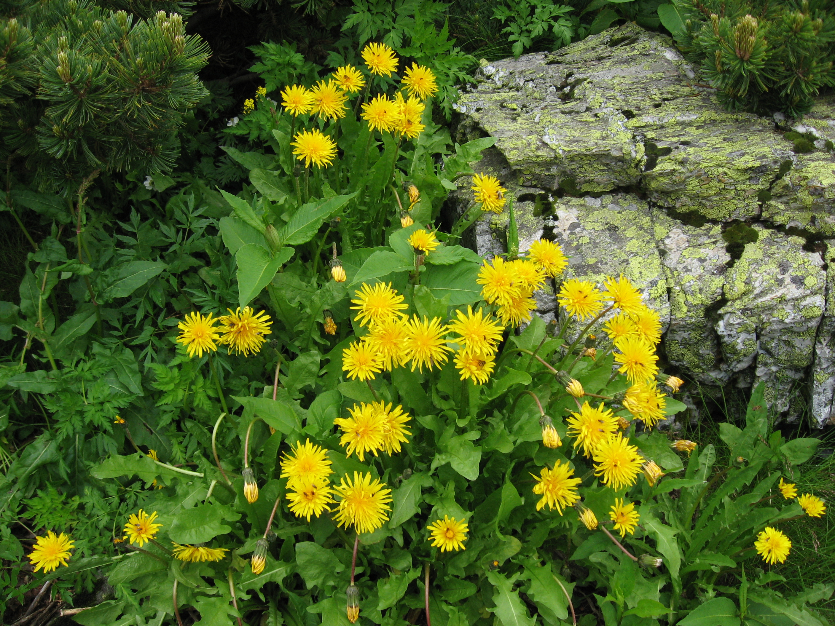 ヤツガタケタンポポ (学名：Taraxacum yatsugatakense)